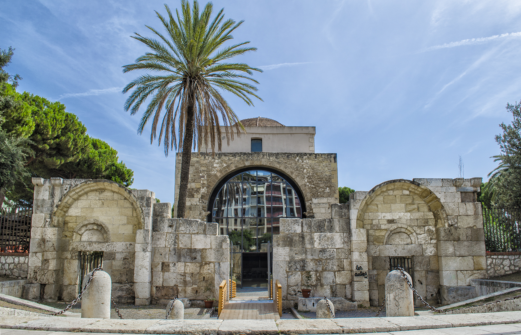 Basilica di San Saturnino - MIBAC 092009546-MIBAC This is a photo of a monument which is part of cultural heritage of Italy.